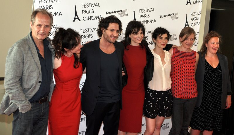 L'équipe du film À cœur ouvert à une avant-première. De gauche à droite, Hyppolite Girardot, Marion Laine, Edgar Ramírez, Juliette Binoche, Amandine Dewasmes, Aurélia Petit, Elsa Tauveron.